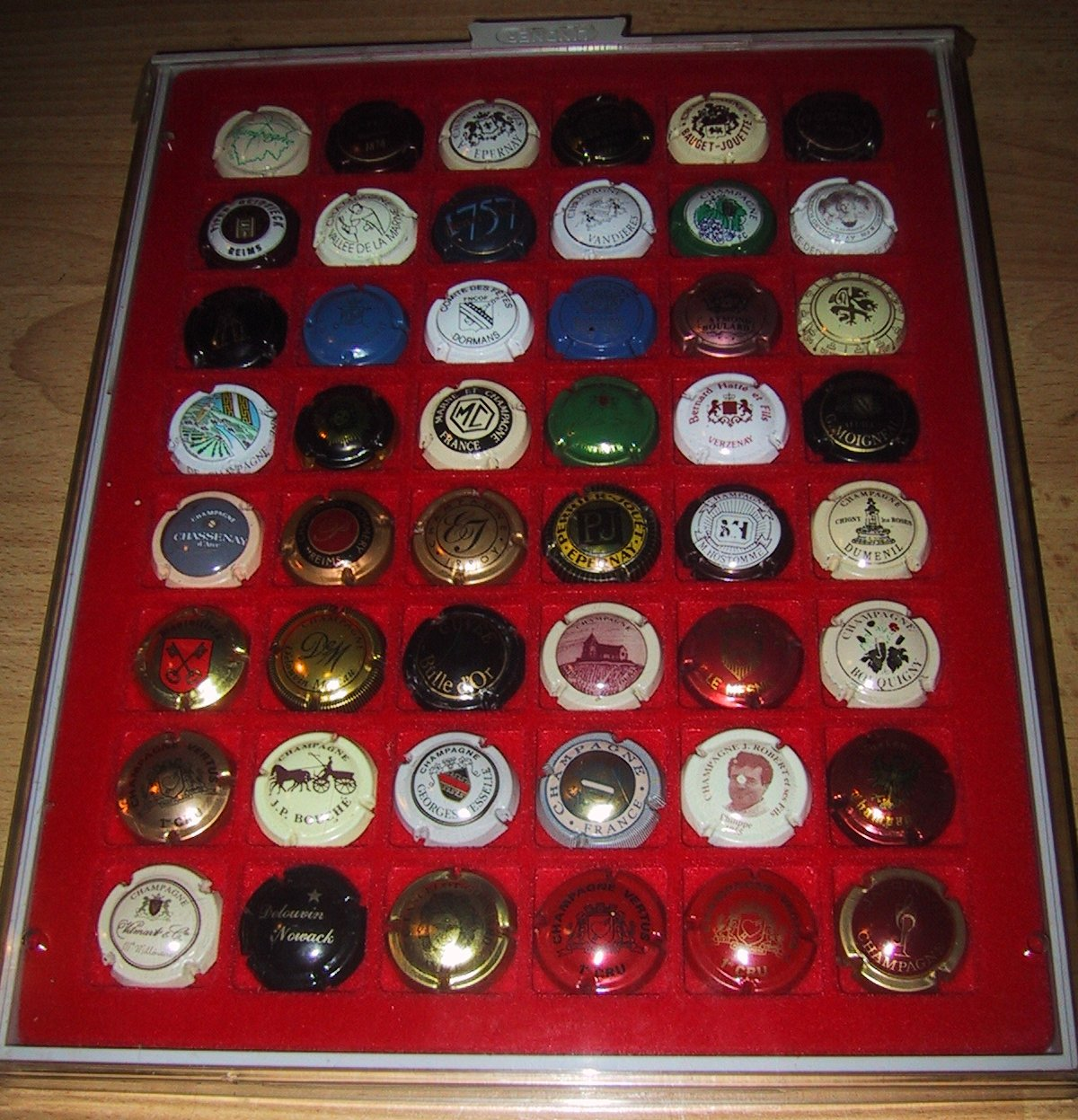 Capsules de muselets de champagne.